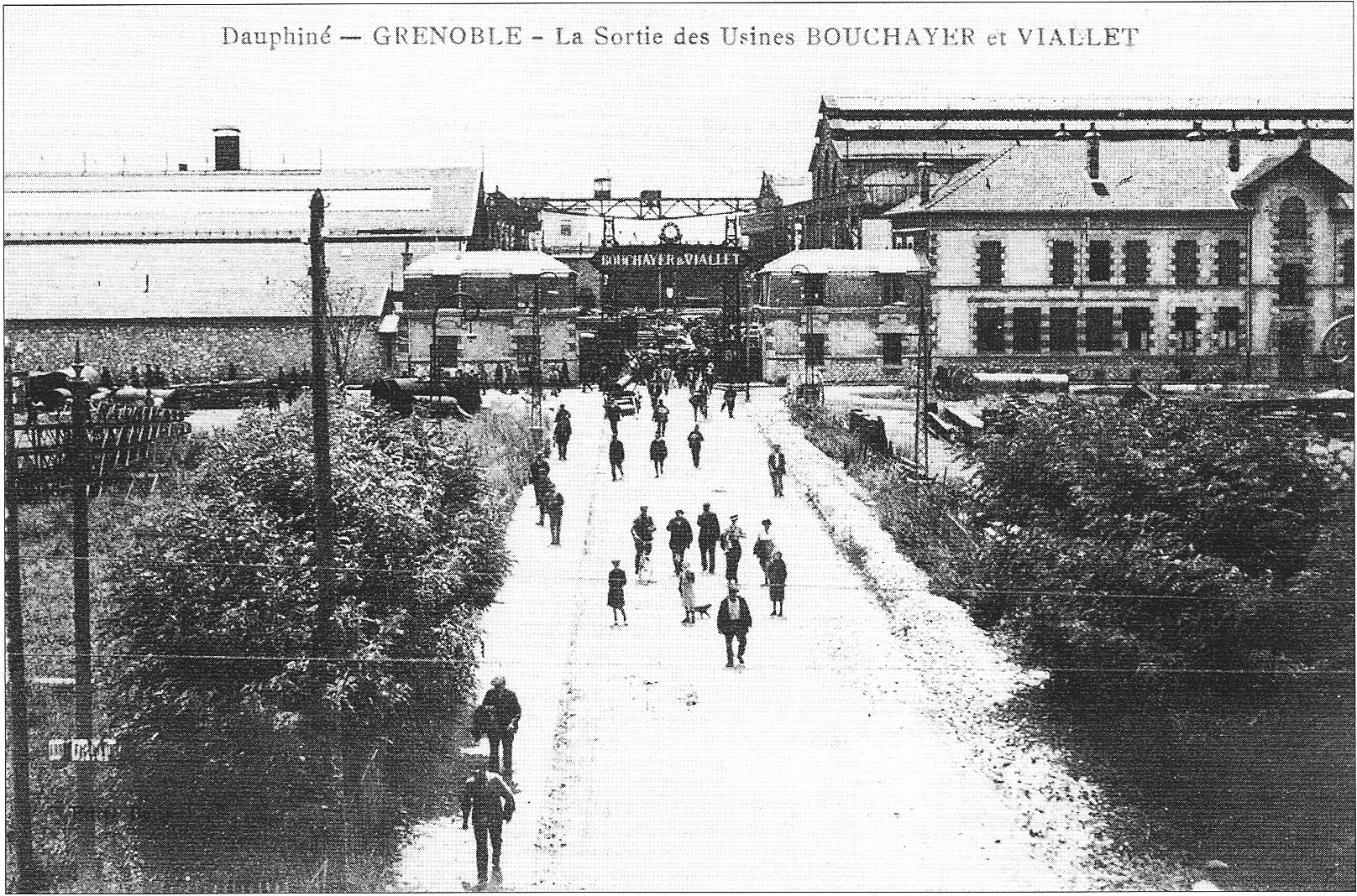 Usine Bouchayer-Viallet, angle rue Ampère et cours Berriat - Grenoble vers 1900